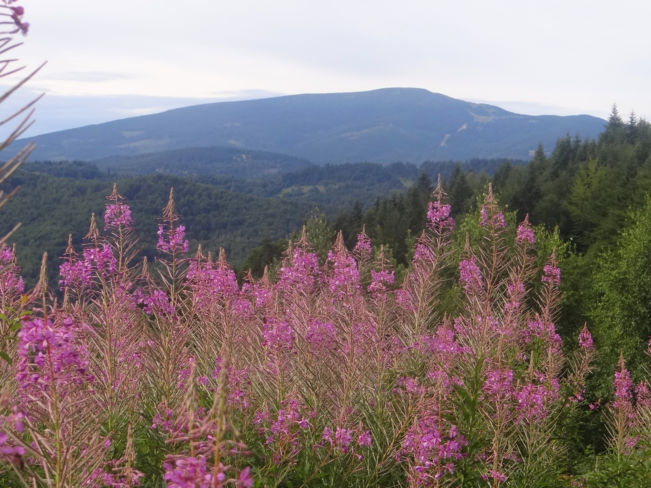 Pilsko, widok z Kalikowego Gronia